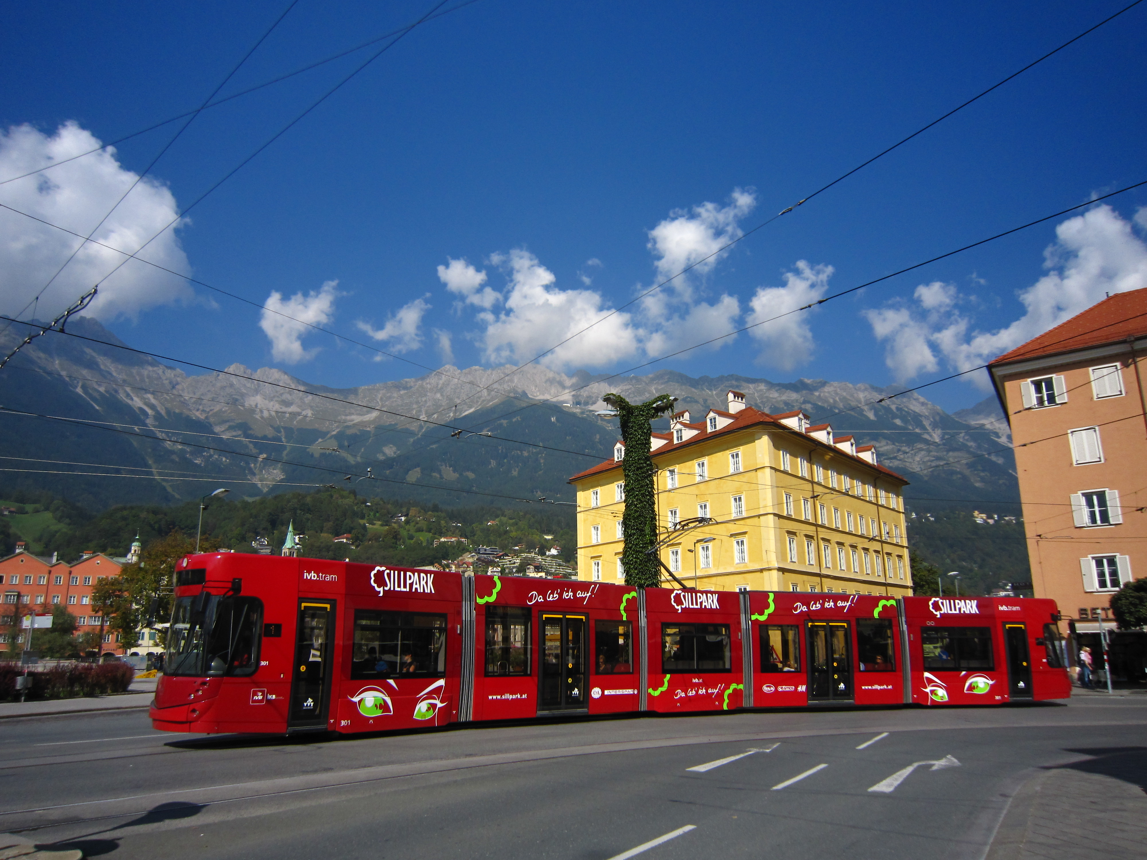 An der Innsbrucker Markthalle fährt eine ivb.tram vorbei.